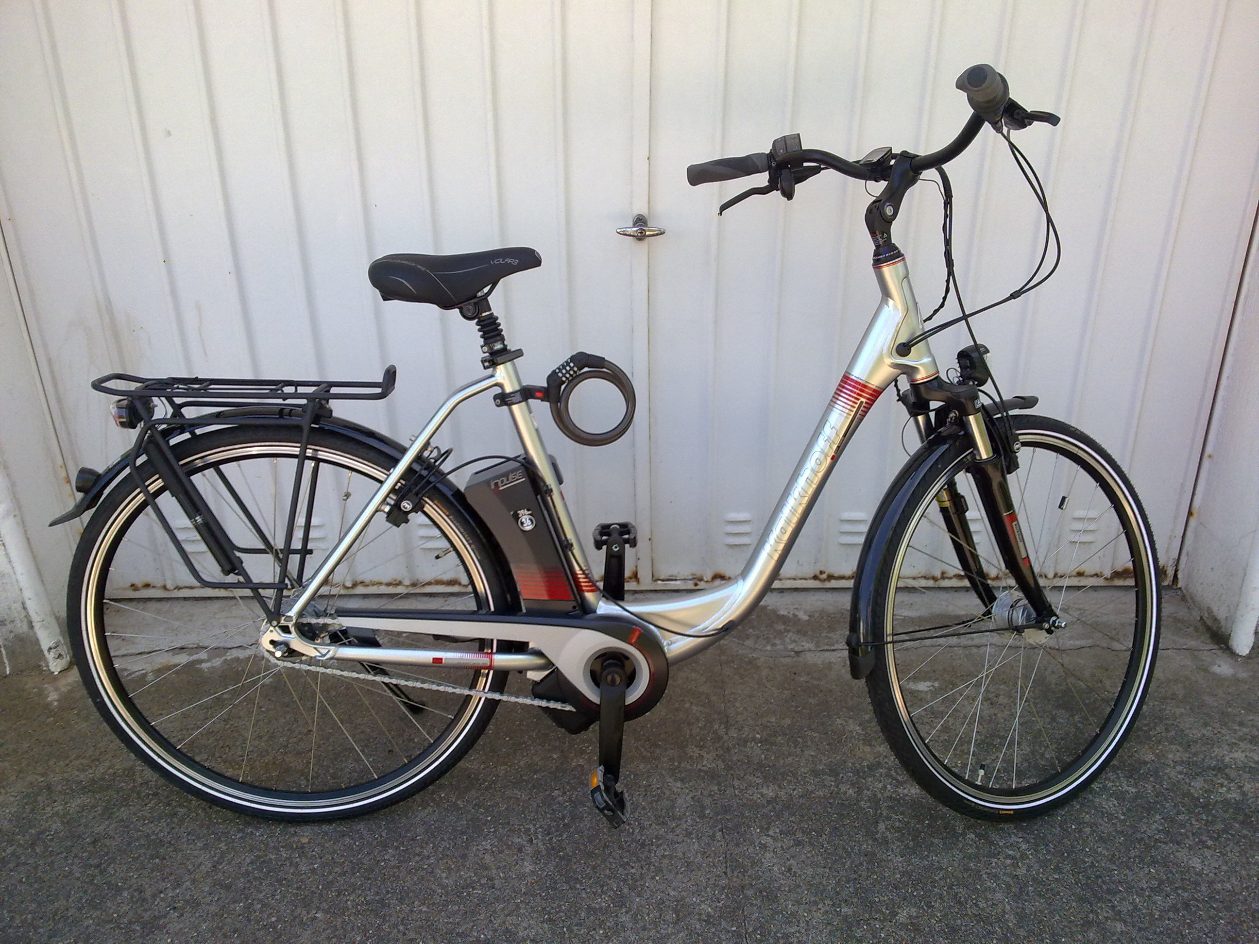 Pedelec von Kalkhoff aus der Agattu-Impulse-Serie (2014) mit 396 Wh-Akku